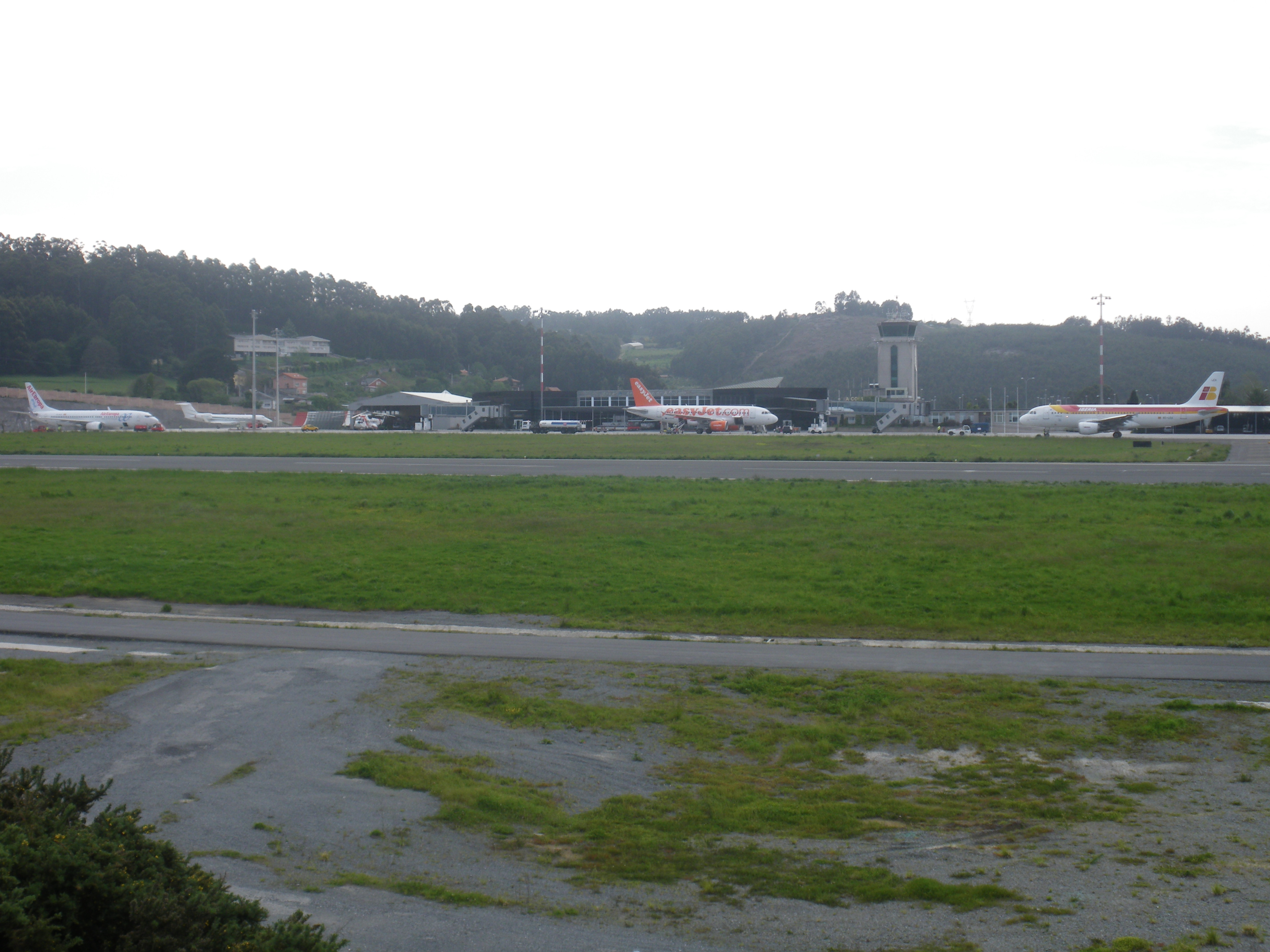 Vista de la plataforma de aviación civil del Aeropuerto de La Coruña, incluyendo aviones A319 de Easyjet, A320 de Iberia, B73H de Air Europa y una G550 privada.